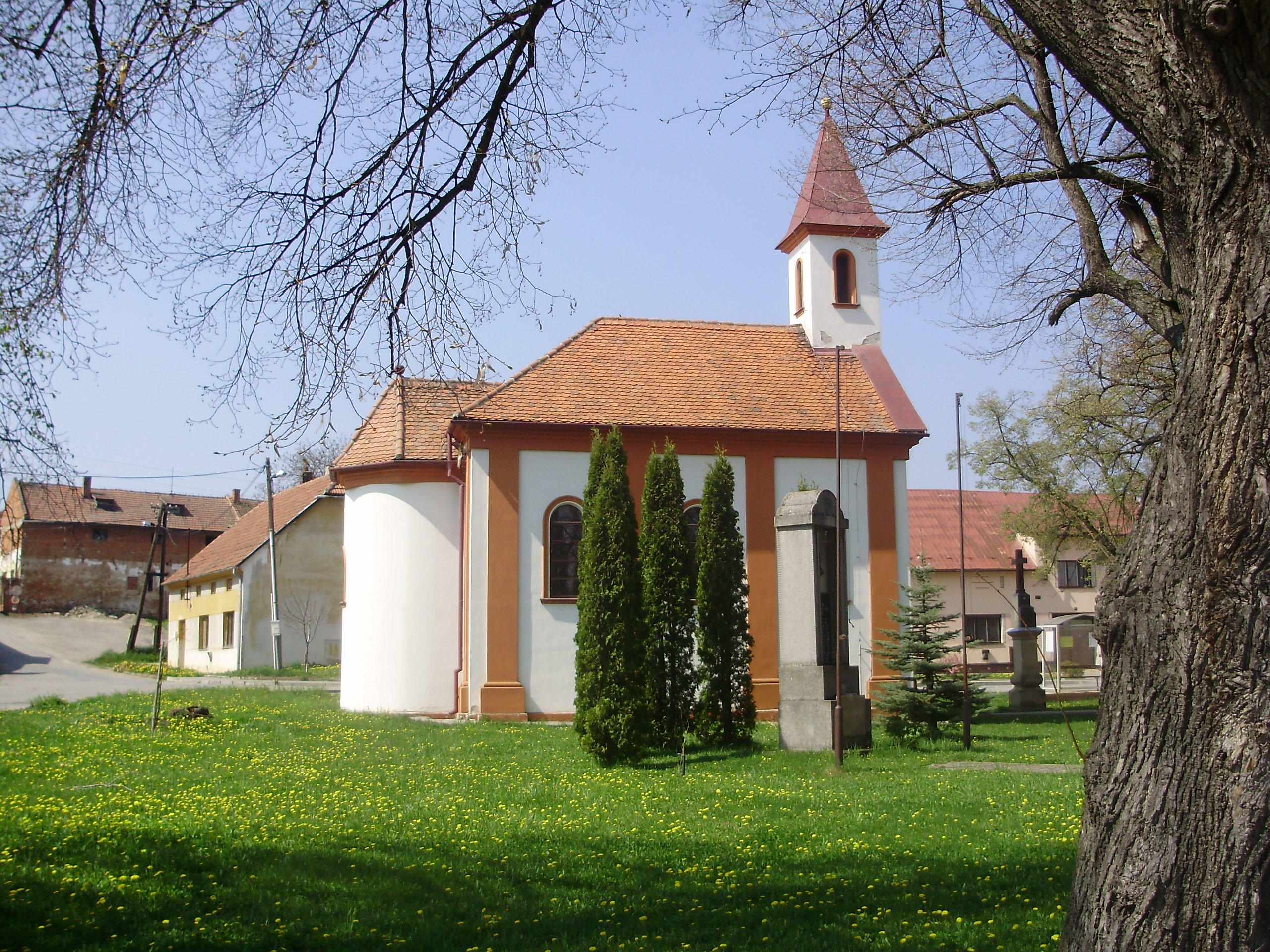 Kaple svatého Floriána Dětkovice